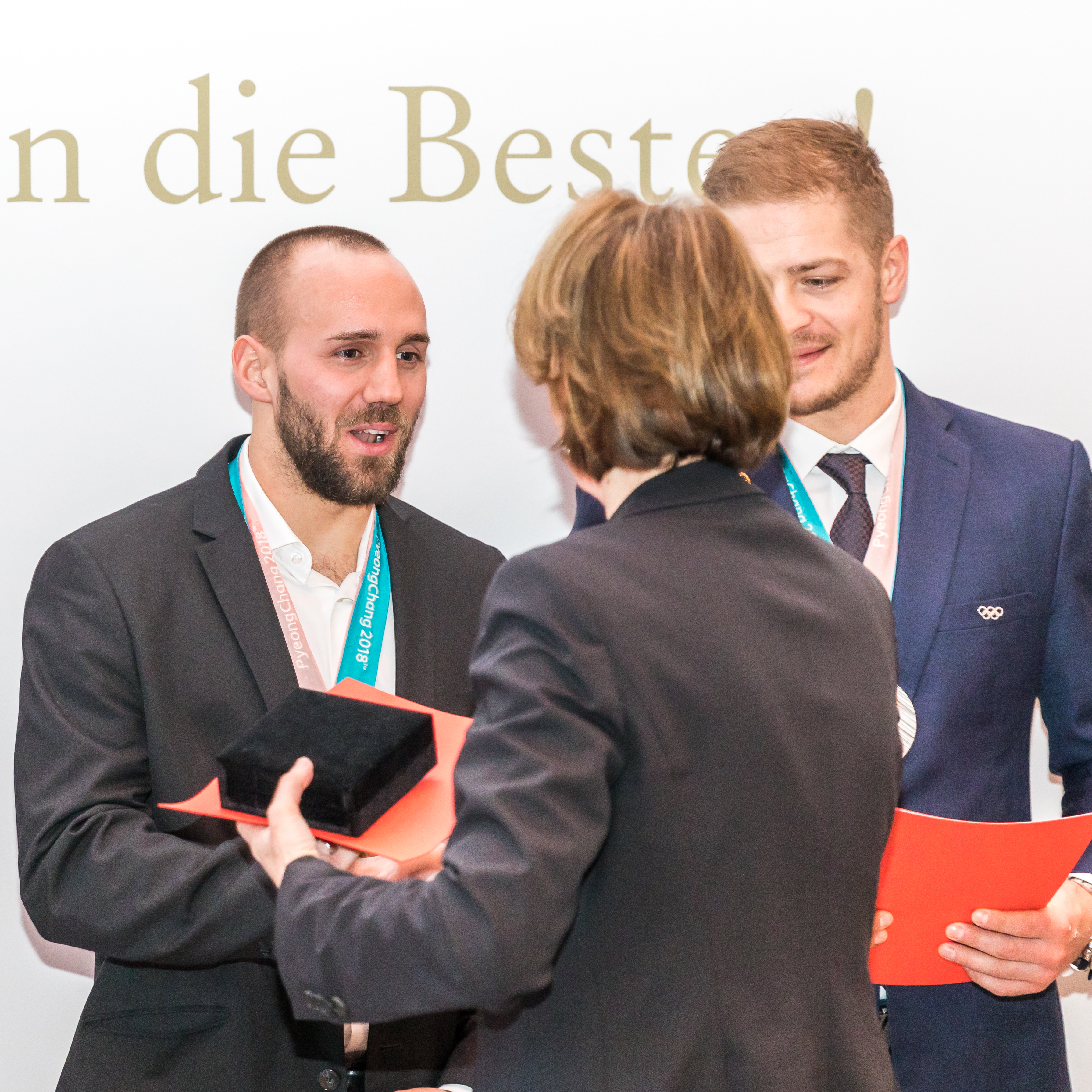 Empfang Medaillengewinner XXIII. Olympische Winterspiele im Rathaus Köln